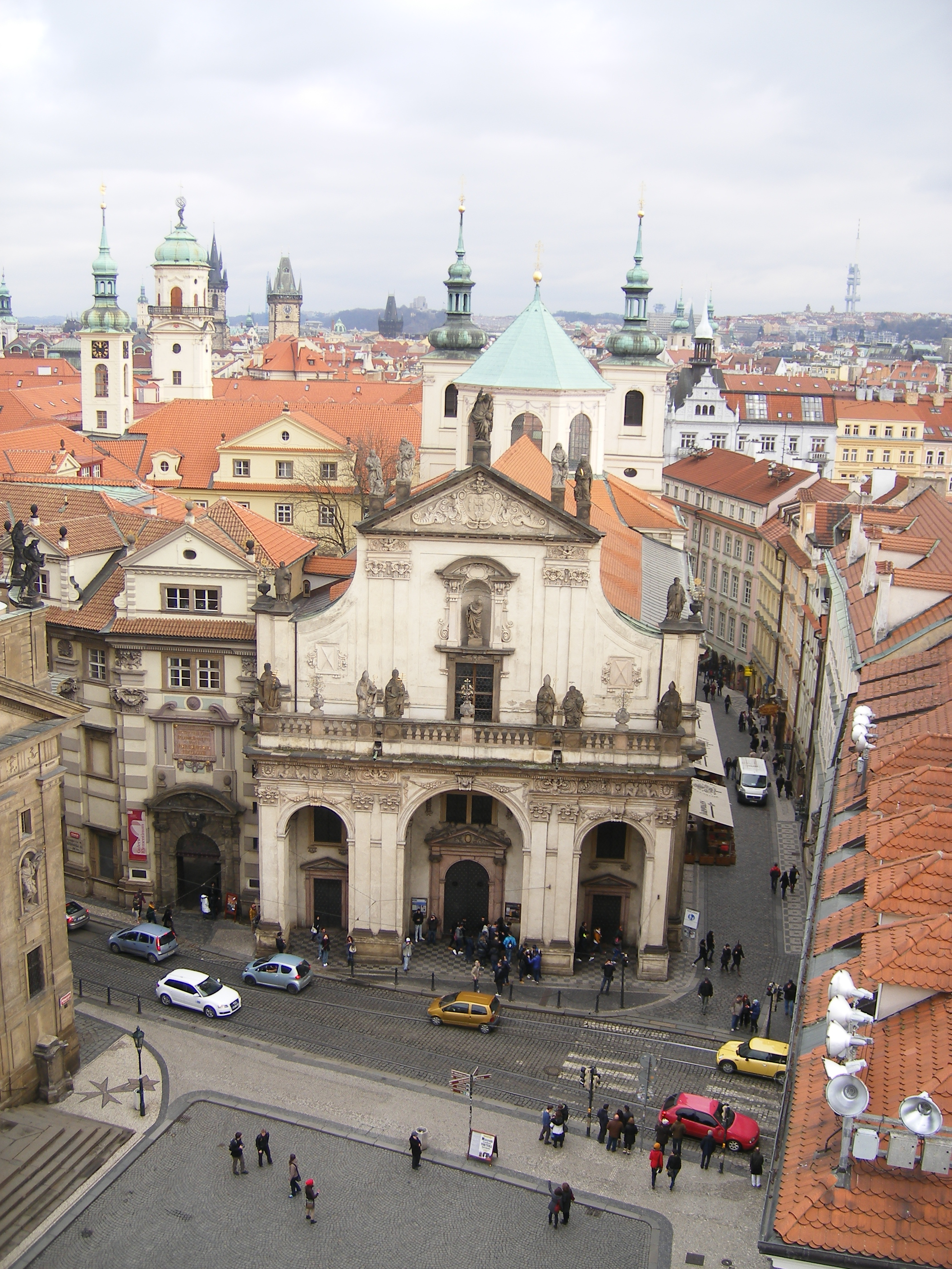 Tato fotografie zobrazuje památkový objekt ID: 38162/1-7 v České republice.